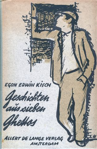 boekband ontwerp van Paul Urban